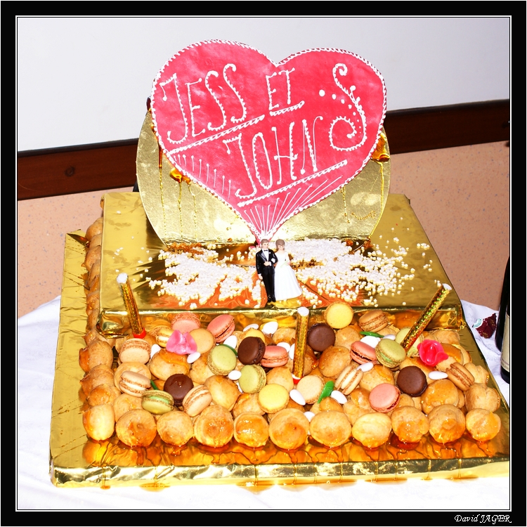 Wedding cake